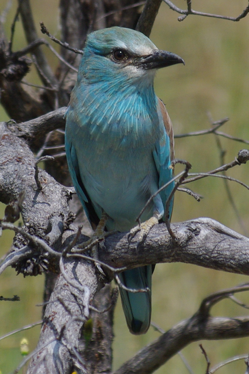 Blauracke, KNP